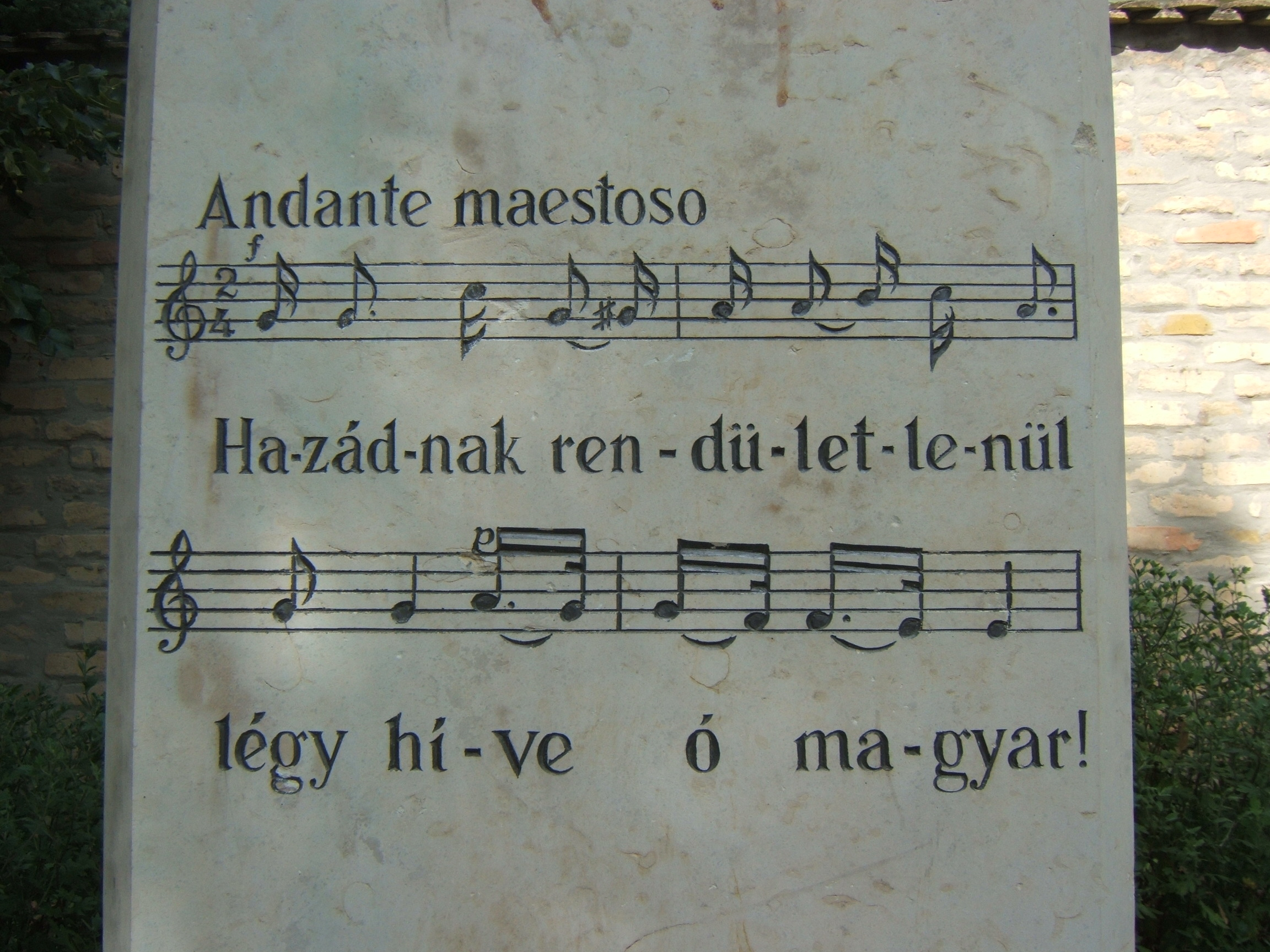 Simontornya, Egressy-emlékmű